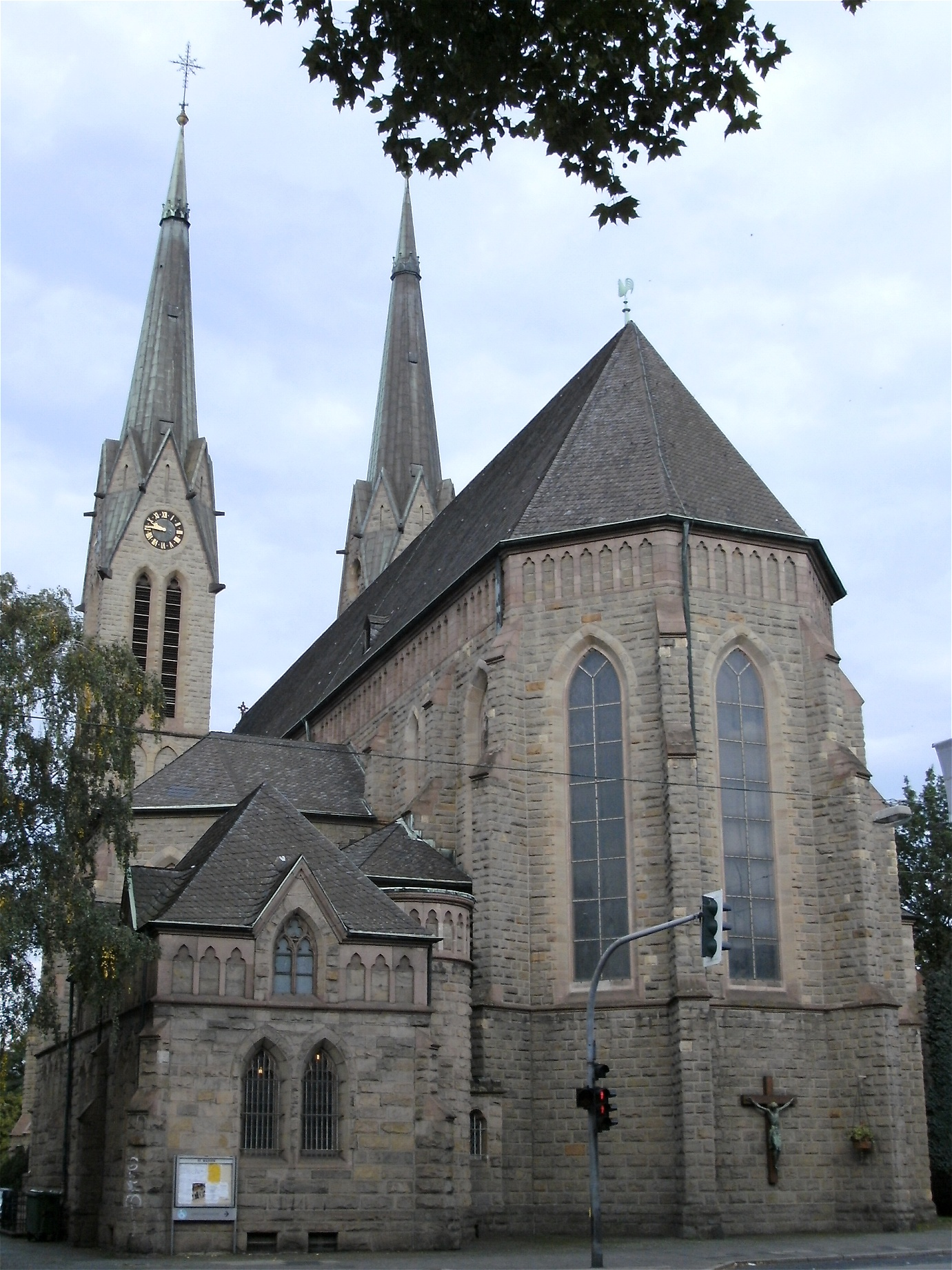 Marienkirche, Oberhausen (Rhld.)